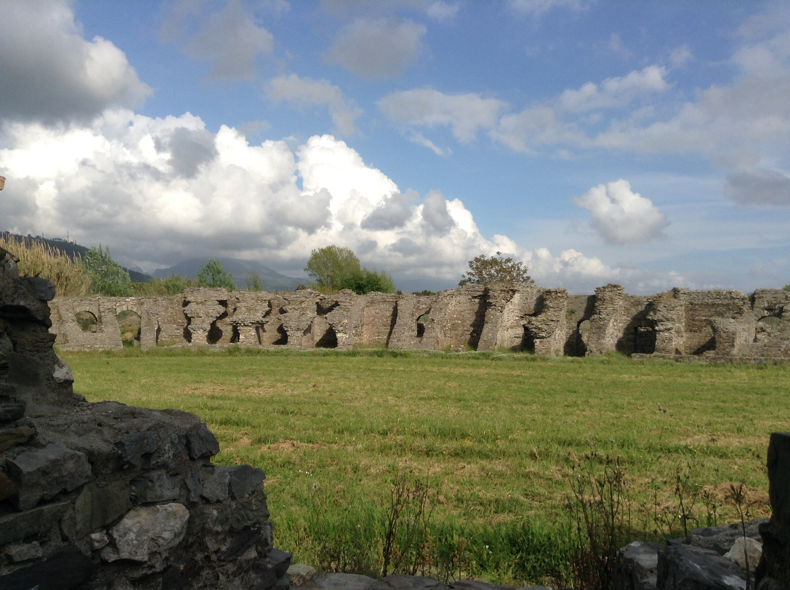 Area archeologica e sistema museale dell'antica città di Luna - MIBAC This is a photo of a monument which is part of cultural heritage of Italy.